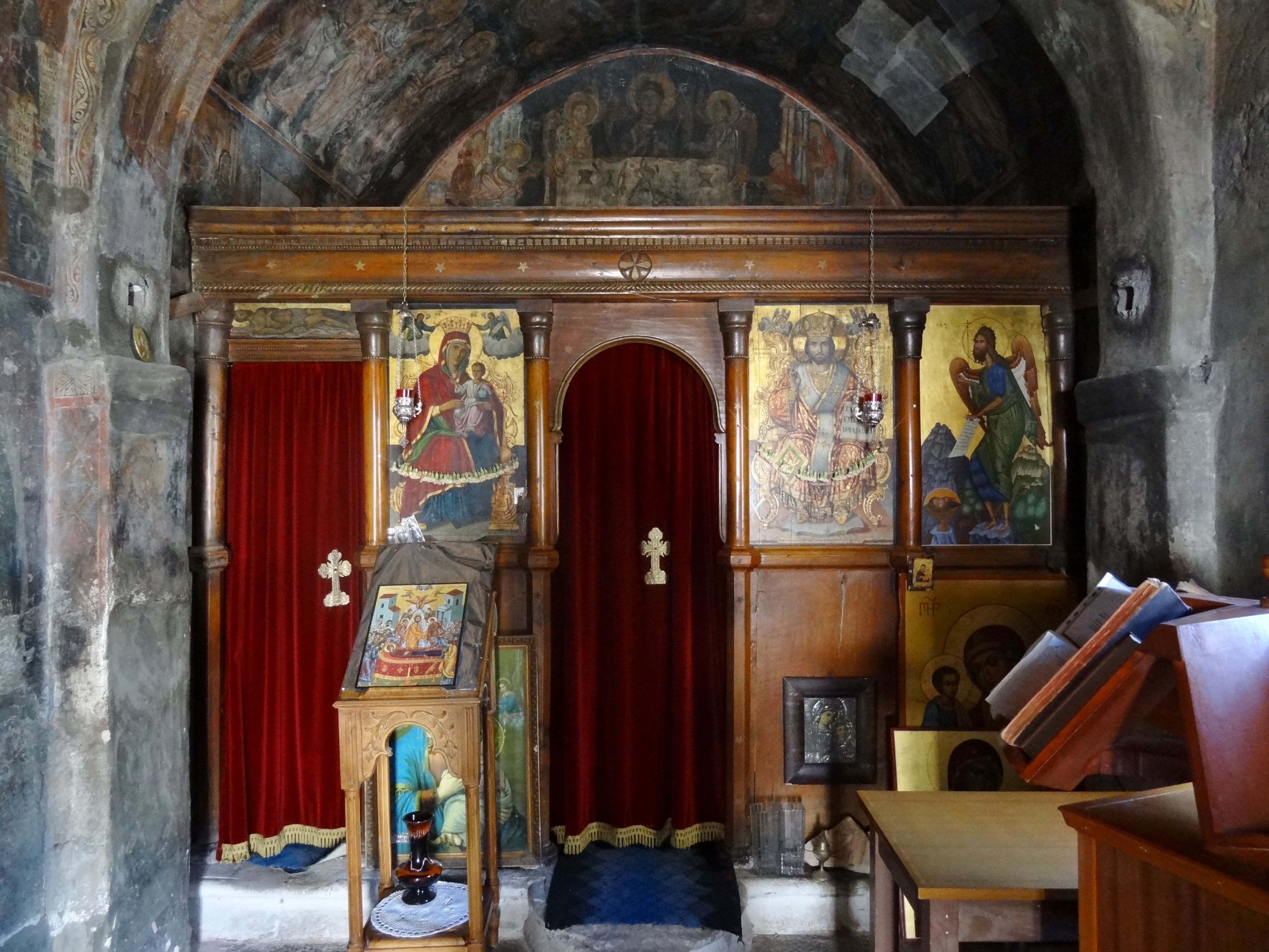 Innenraum der Marienkirche (Ναός Παναγίας) von Thronos, Gemeinde Amari, Kreta, Griechenland